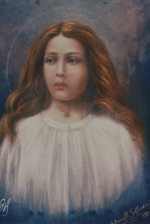 St. Maria Goretti (painting 1929)